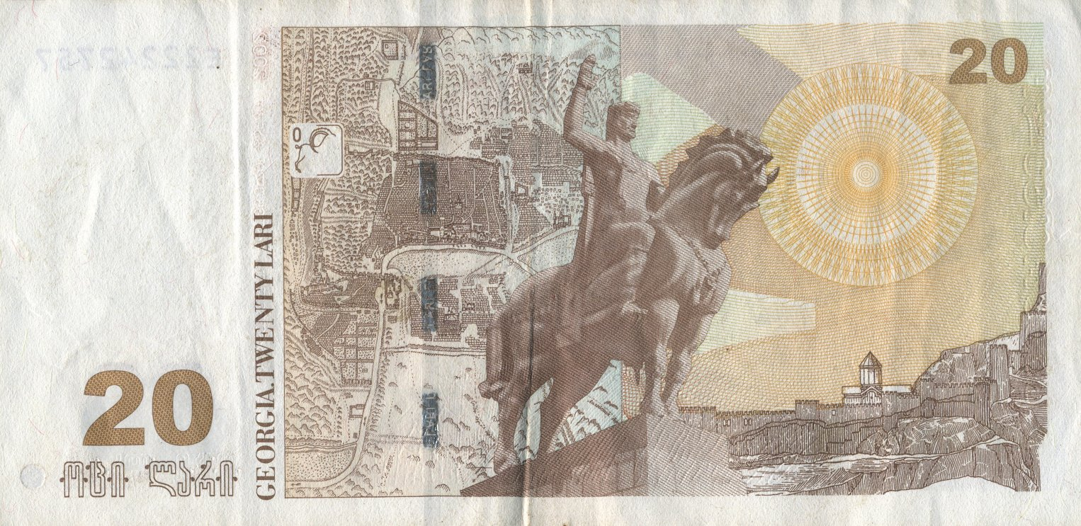 20 Georgian lari (Reverse)